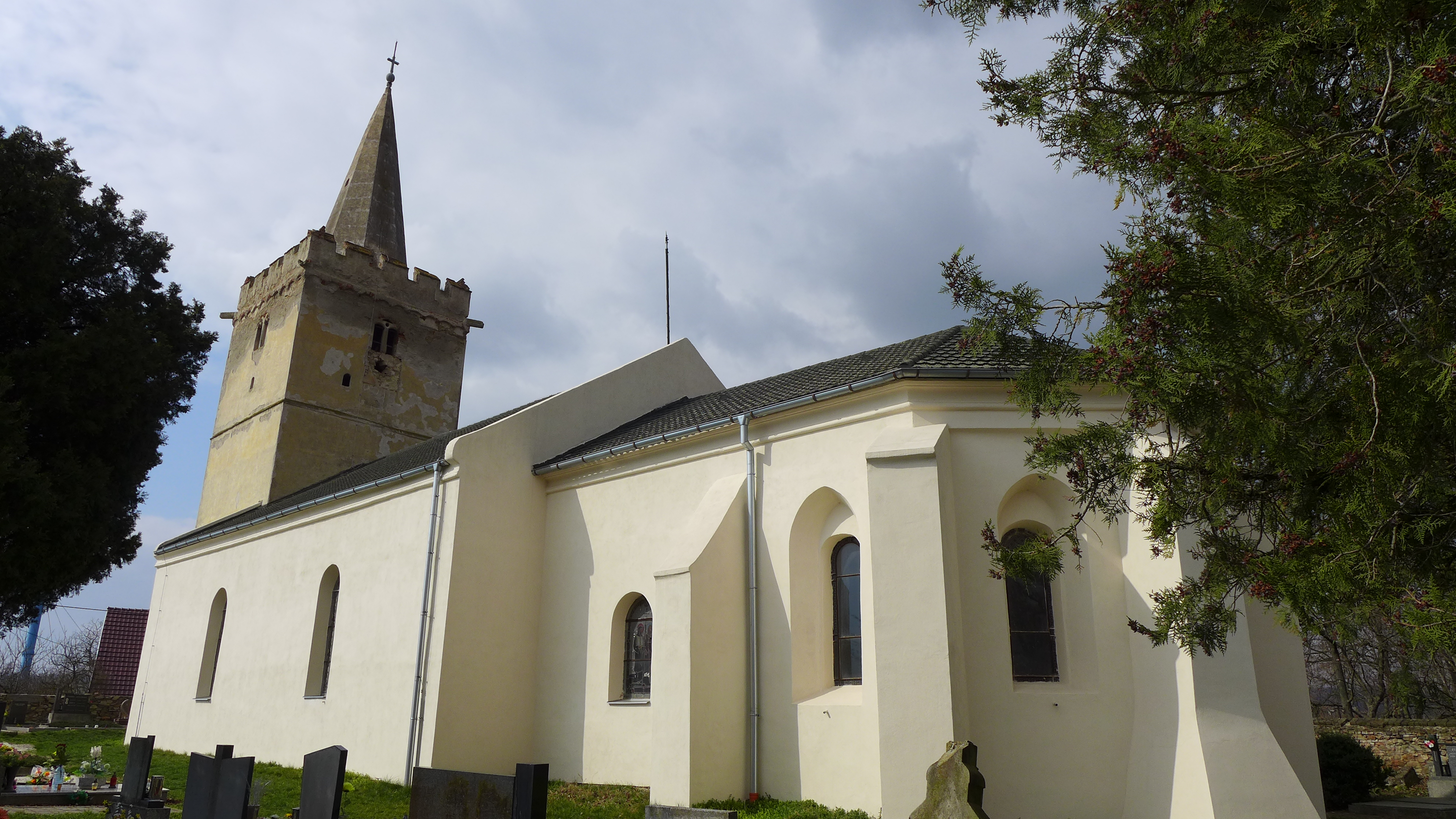 Kostel svatého Jiljí, Našiměřice.